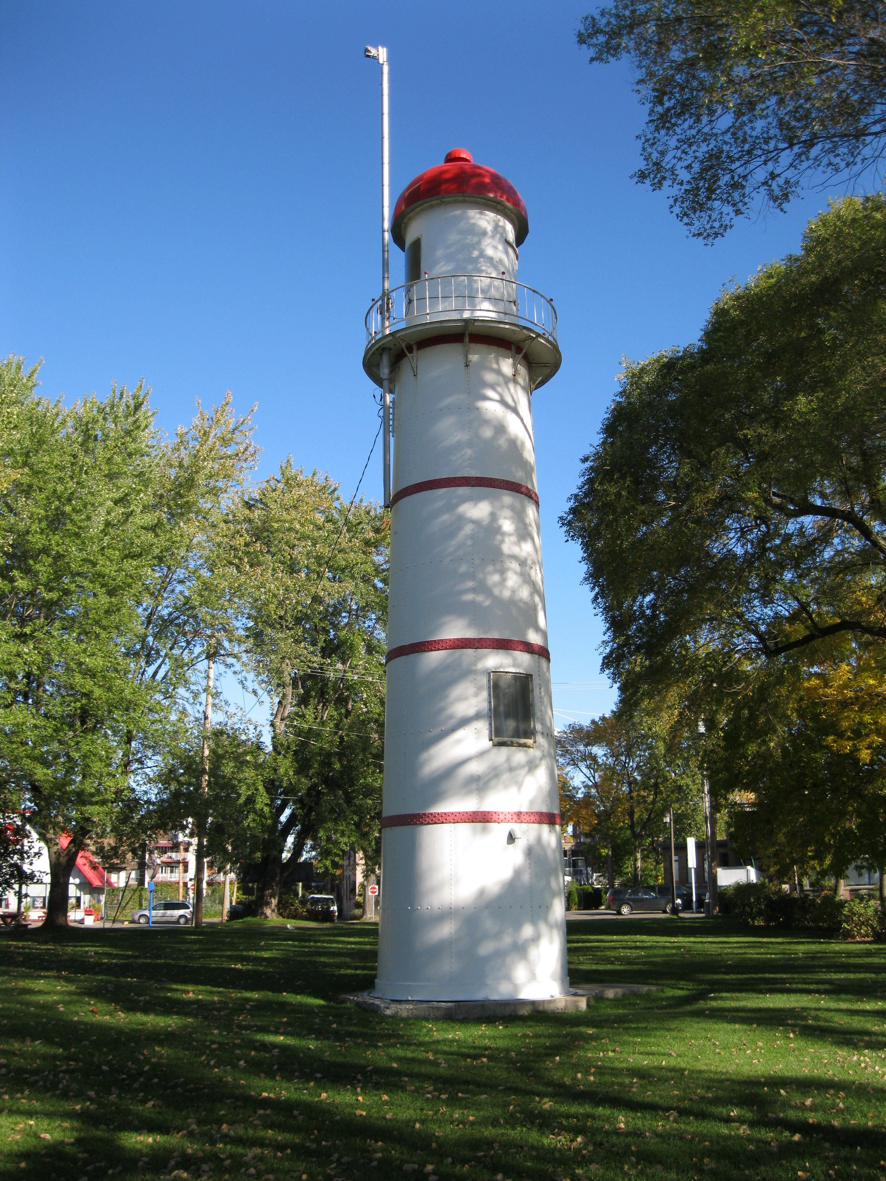 Le phare (arrière) est l’un de deux phares jumeaux qui se dressent dans le parc Saint-Louis, secteur de loisirs municipal situé au bord de l’eau, à Lachine, Québec, Canada.